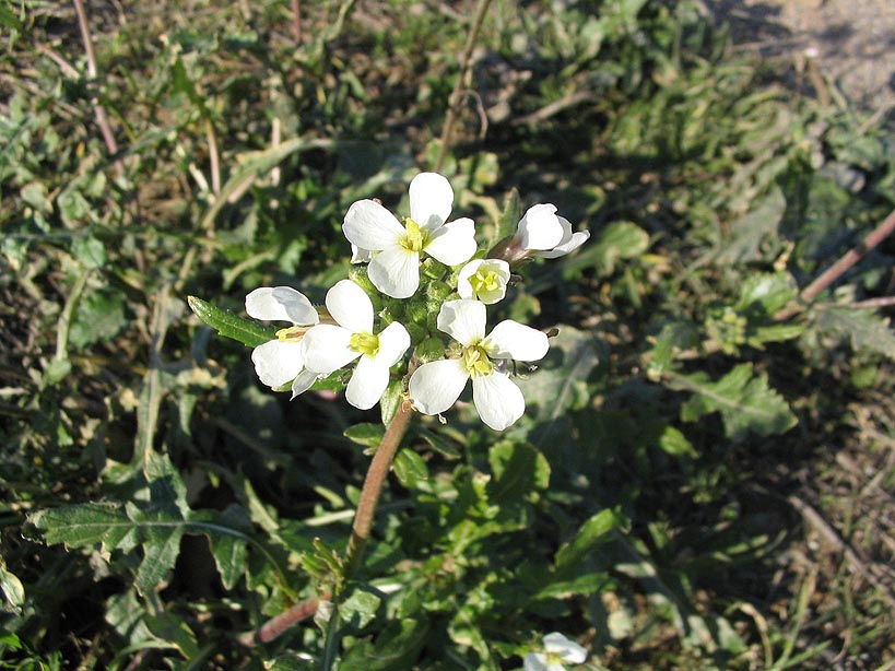 Diplotaxis erucoides (Diplotaxis fausse roquette) Photo prise à Thuir en février 2005 Jean Tosti 2005